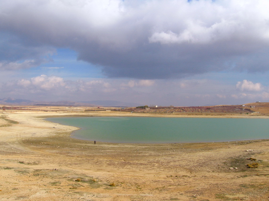 دریاچه هفت برم